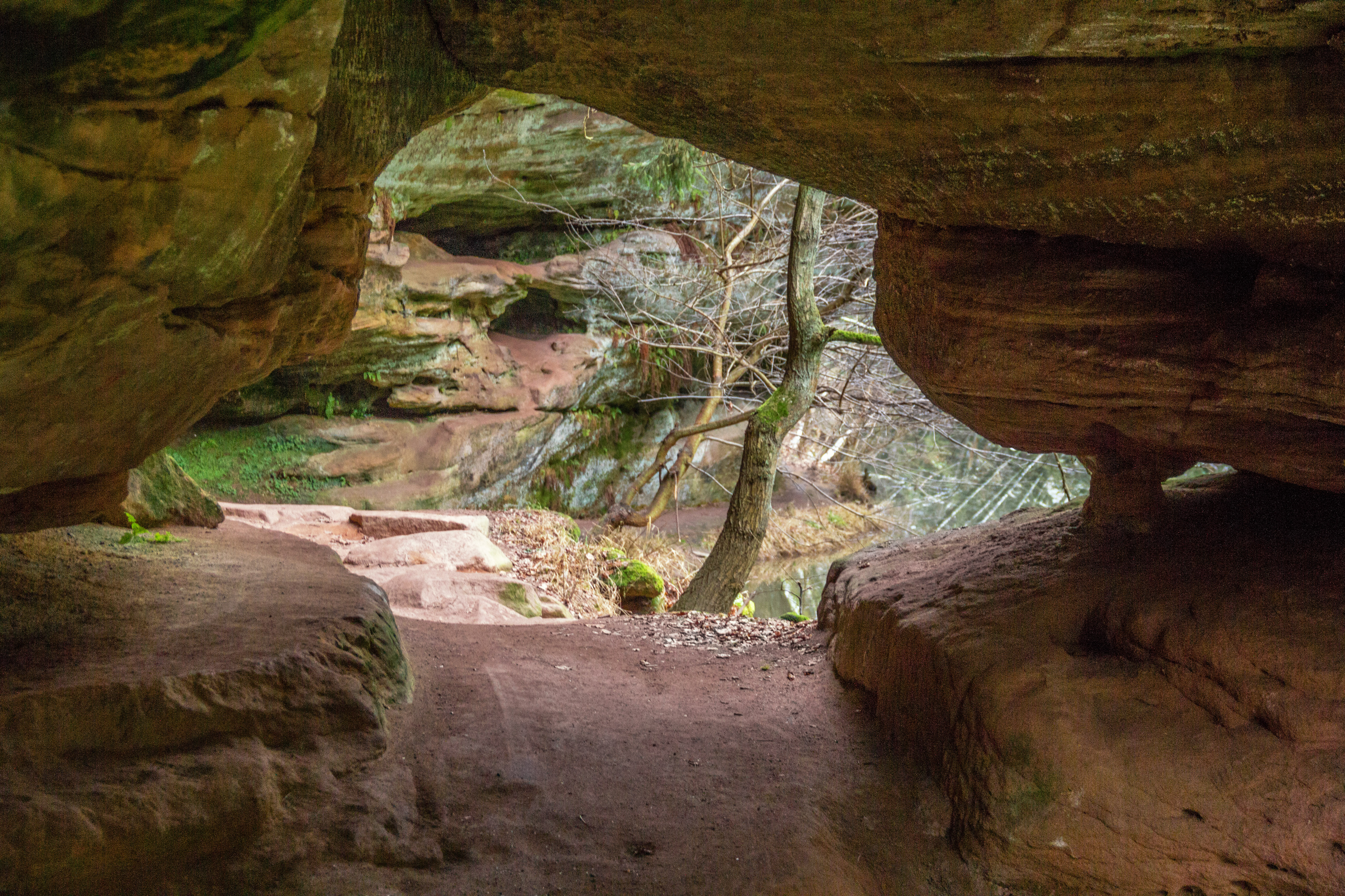 Schwarzachklamm, Naturschutzgebiet „Schwarzach-Durchbruch“, Geotop, FFH-Gebiet, Schwarzenbruck